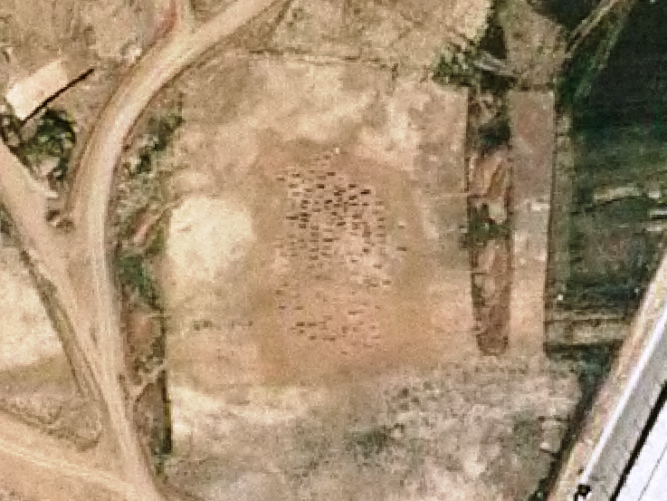 Vista aérea de una necrópolis desenterrada en 2006 en el Yacimiento de Loranca-El Bañuelo (Fuenlabrada)